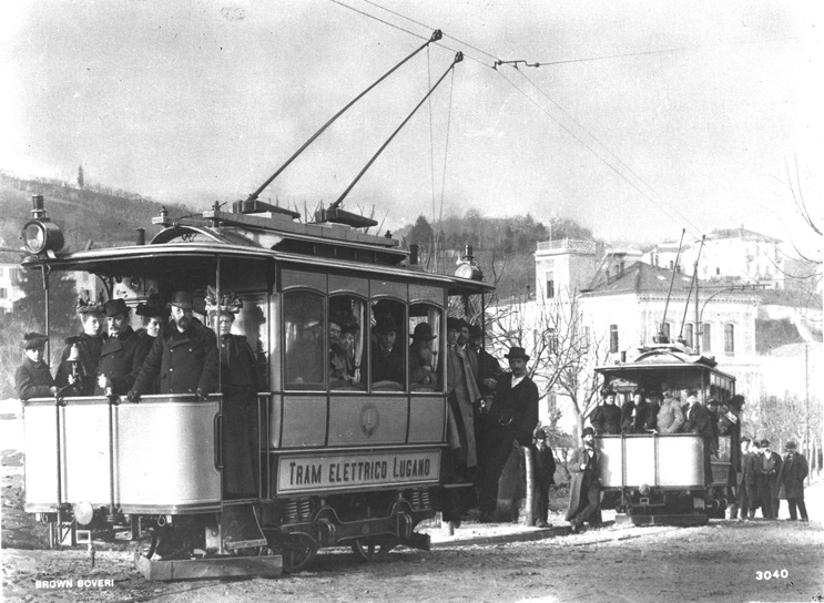 Tramtriebwagen Ce 1/2 der Strassenbahn Lugano, betrieben mit Drehstrom 400 Volt 40 Hertz.